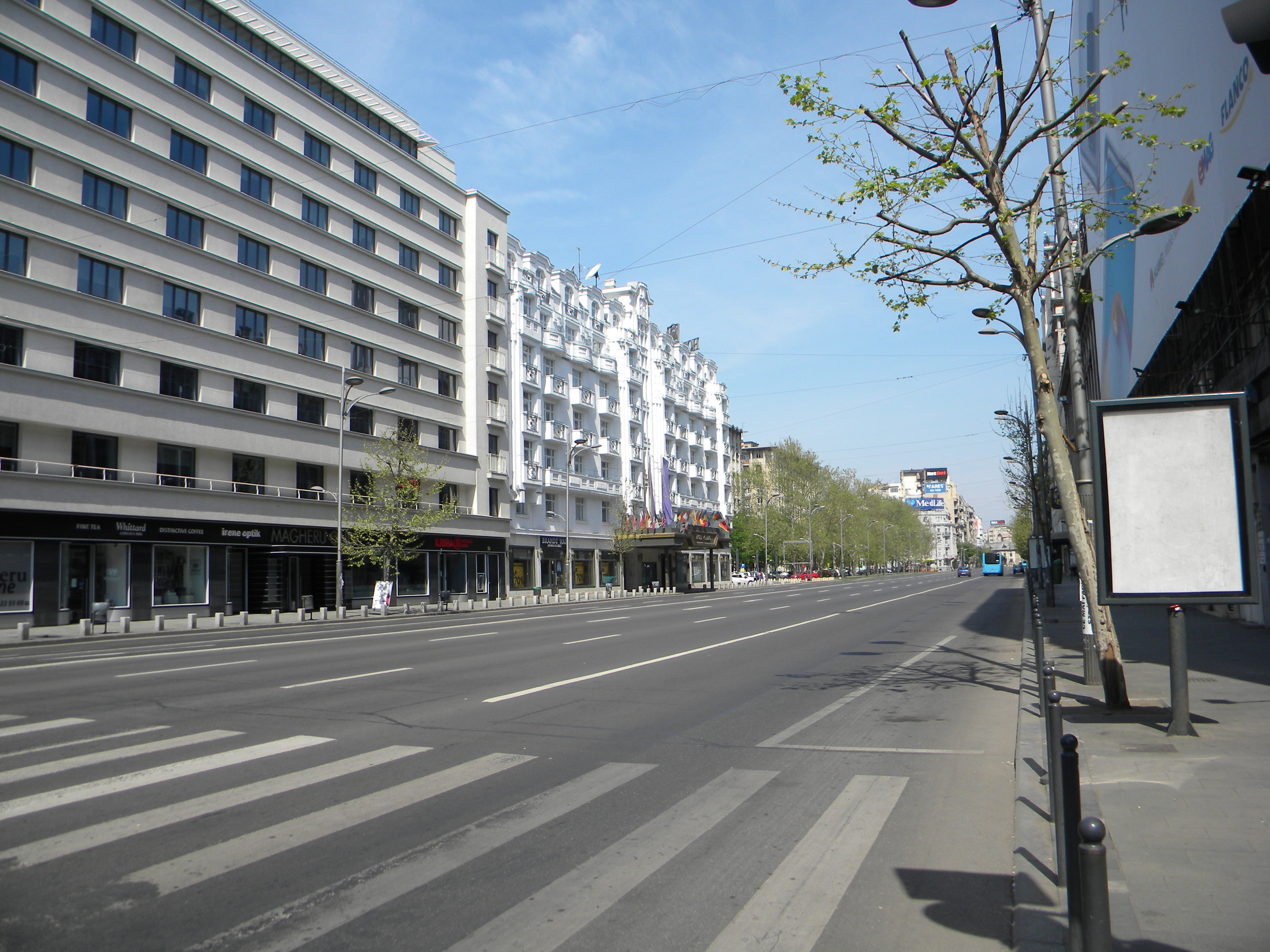 Bucuresti, Romania. Bulevardul Magheru, 19 Aprilie 2020. Interdictie CORONAVIRUS.